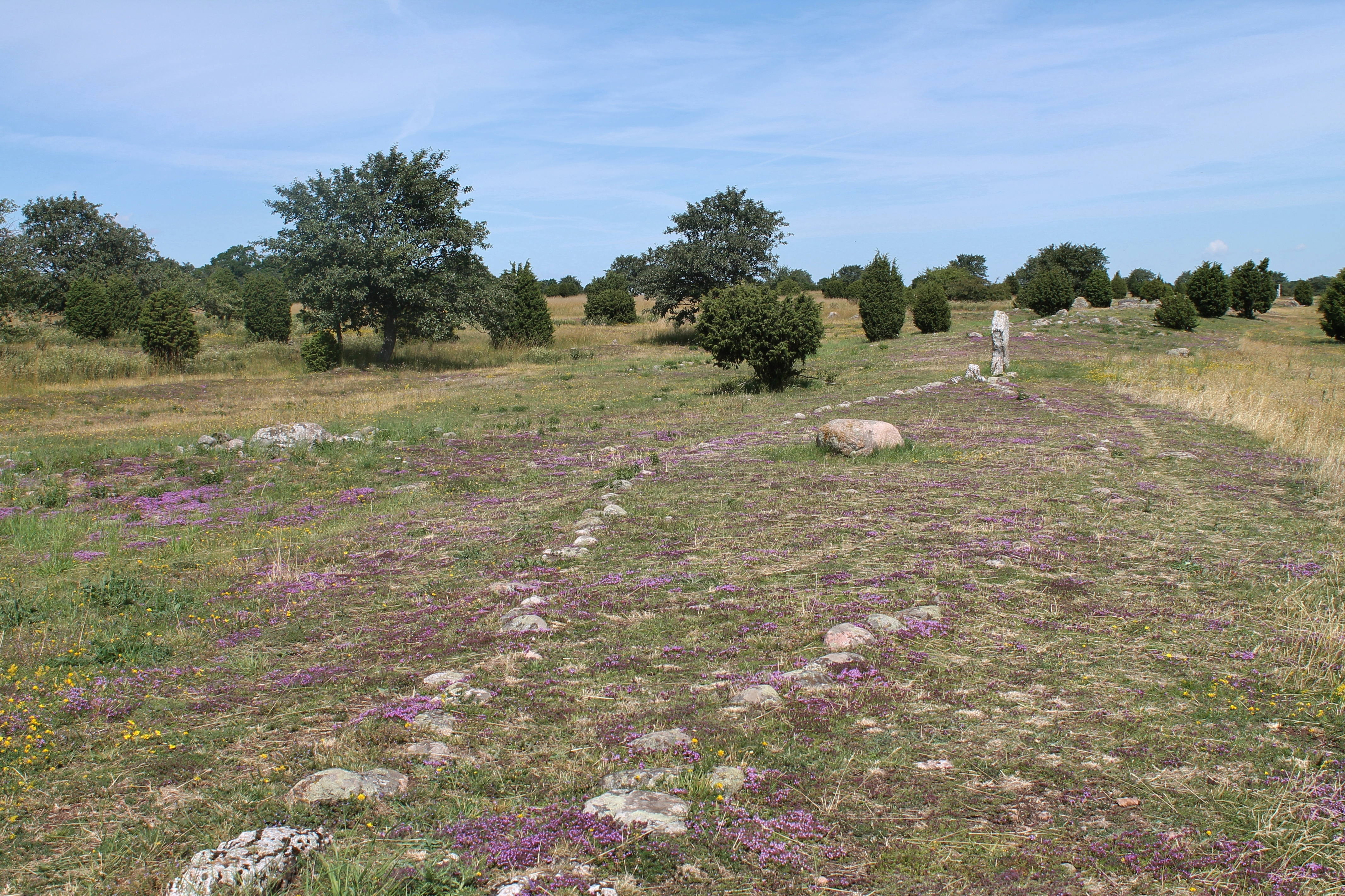 Karums alvar,Öland. Skeppssättningen Nokas ark.